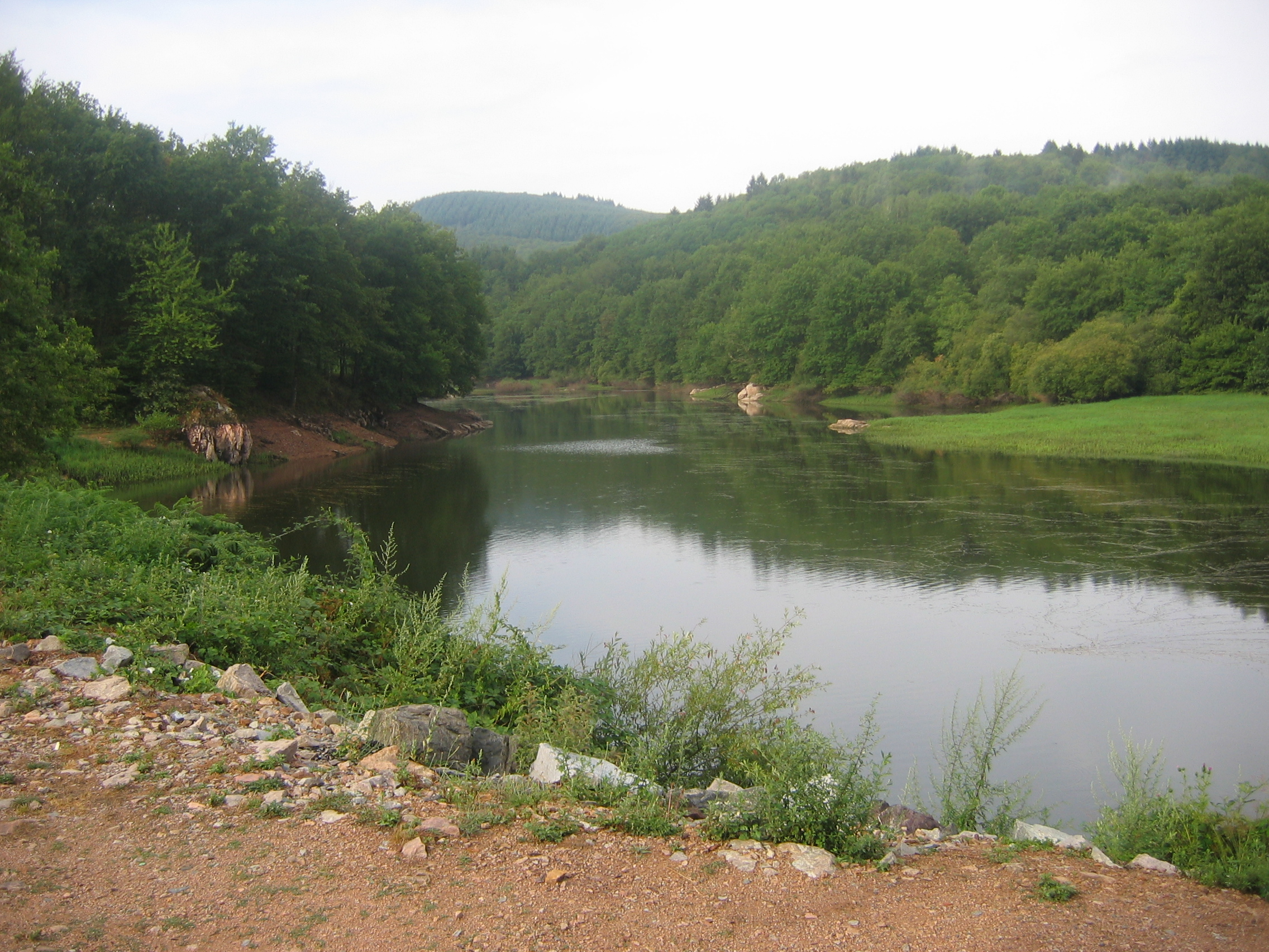 Paysage du Morvan, Bourgogne, France : Lac de Pannecière